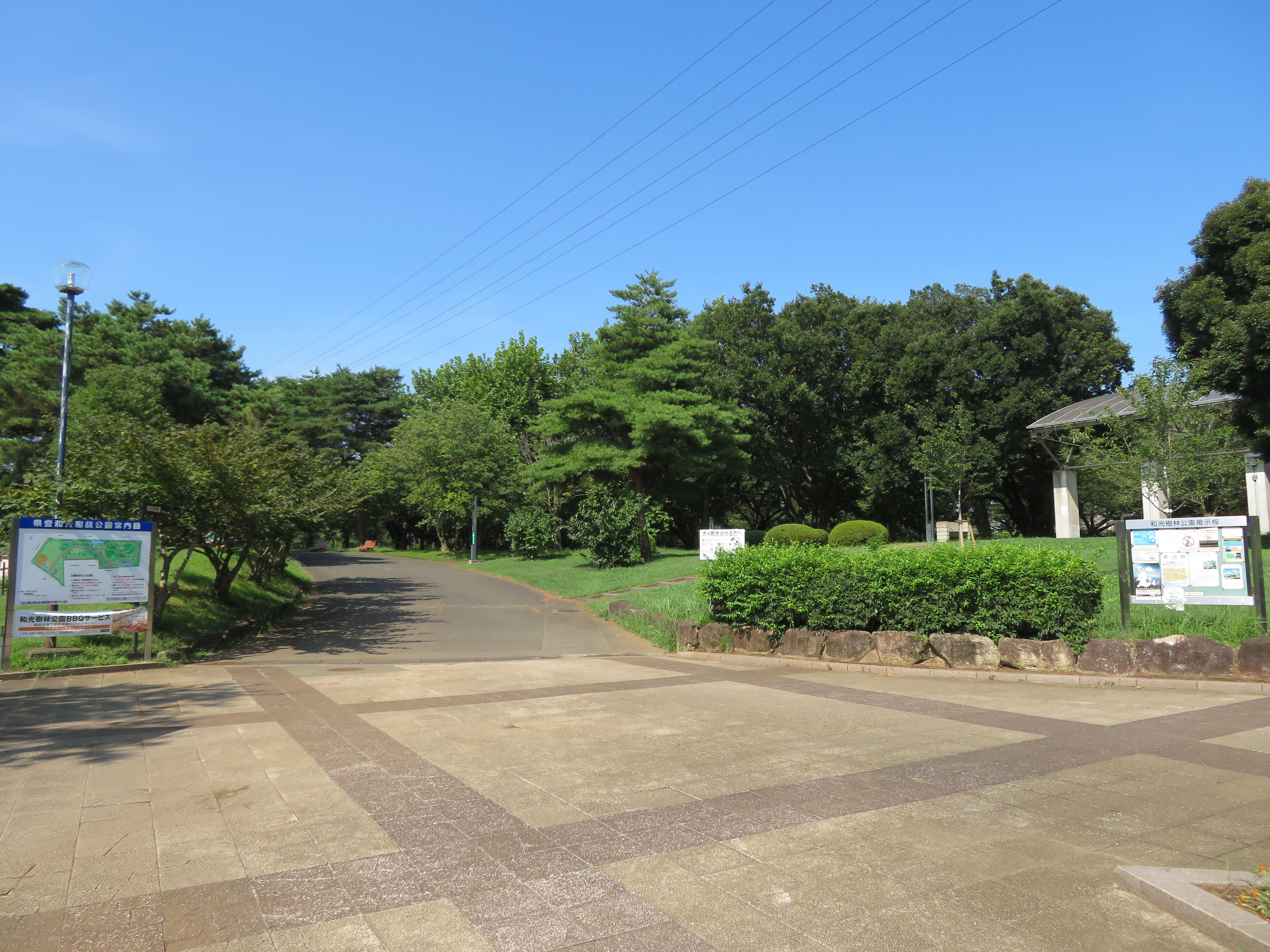 埼玉県和光市に所在する埼玉県営和光樹林公園（エントランス広場付近を撮影）